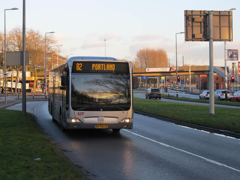 RET 351 als lijn 82 op de Zuiderparkweg